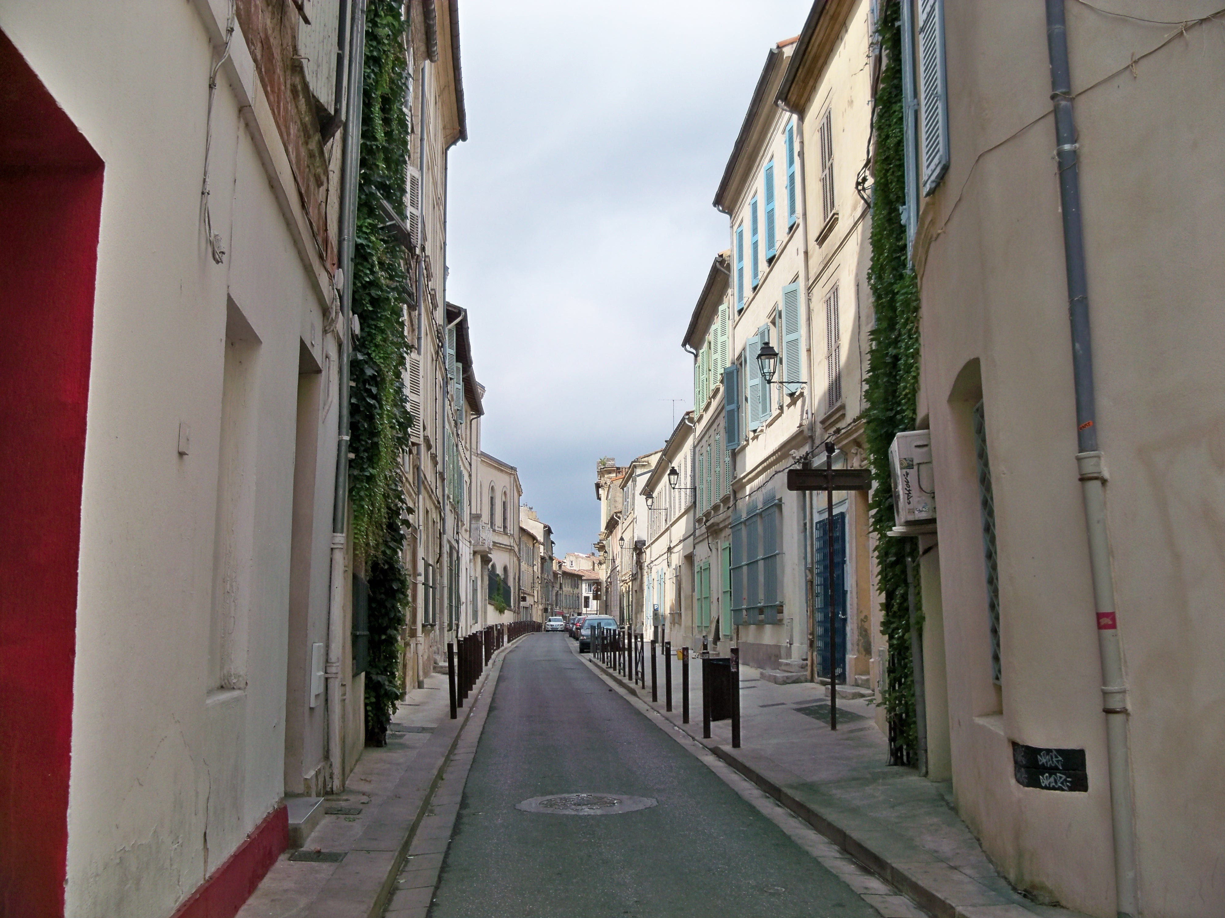 Rue des Lices à Avignon, Vaucluse, France